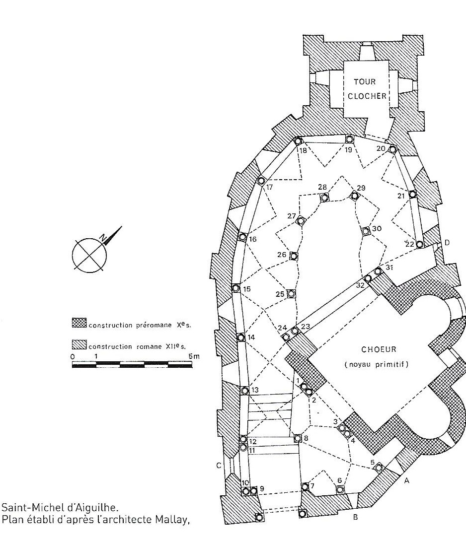 plan réalisé par l'architecte diocésain Mallay 1805-1883